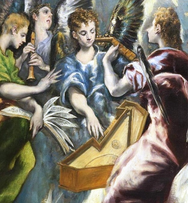 Détail du tableau L'annonciation de El Greco montrant un ange jouant du virginal